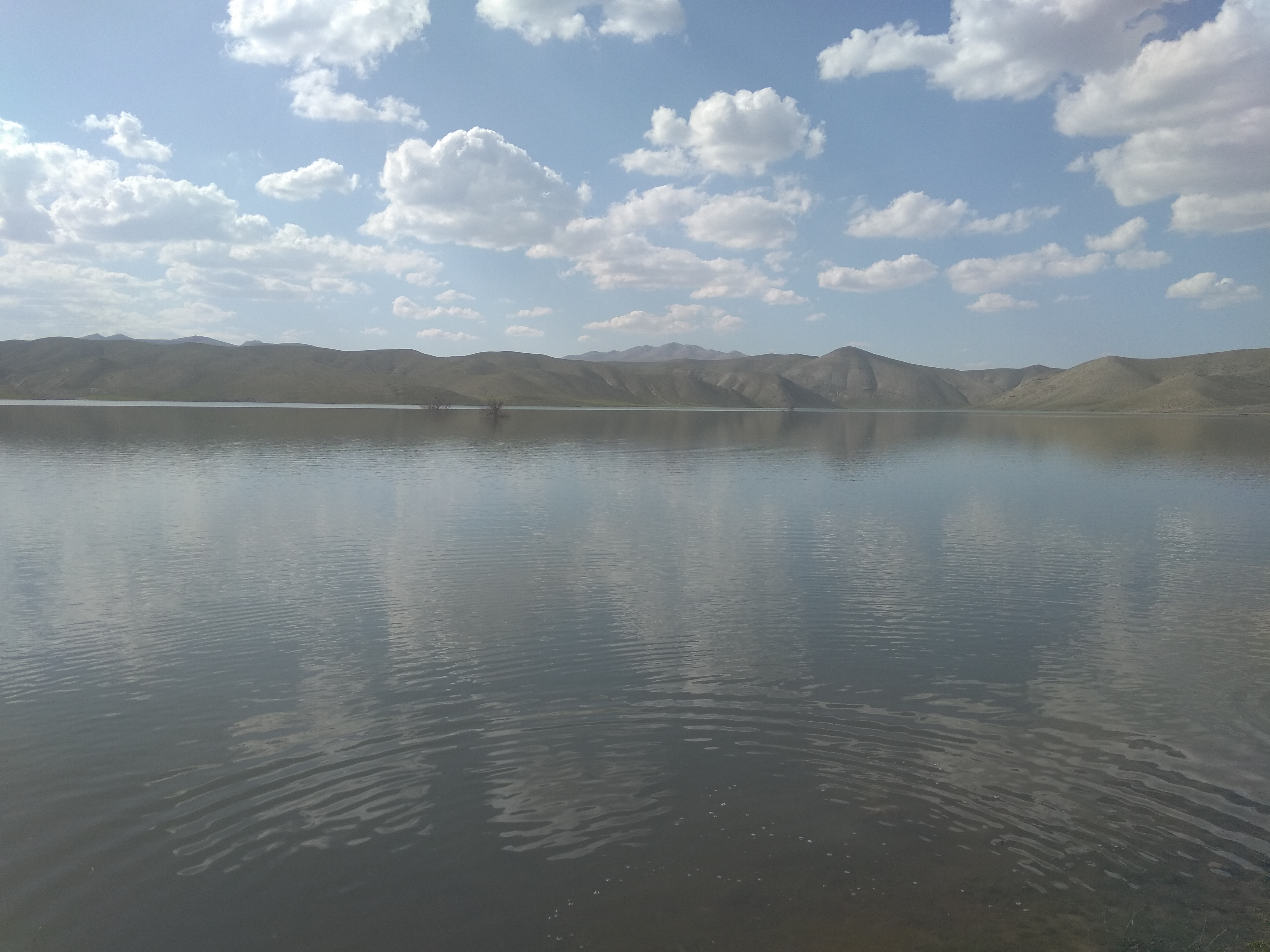 . (Picture of the disappearance of the village of Chehel Amiran Bijar under the Talvar Dam) تصویر محو شدن روستای چهل امیران چنگ الماس بیجار در زیر آب سد تالوار در 5 اردیبهشت 1398